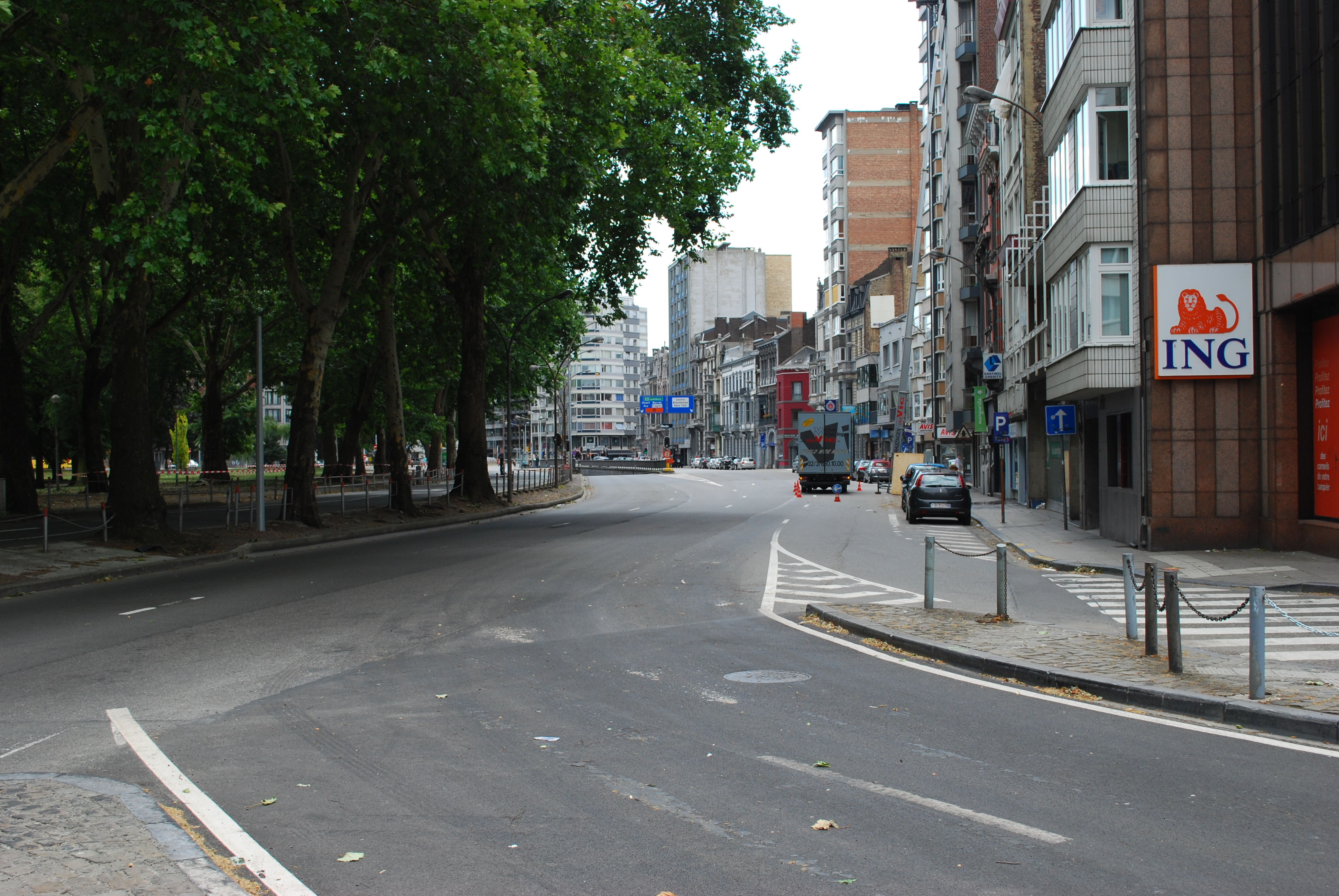 Le boulevard d'Avroy à Liège, à hauteur de la rue Sainte-Marie.